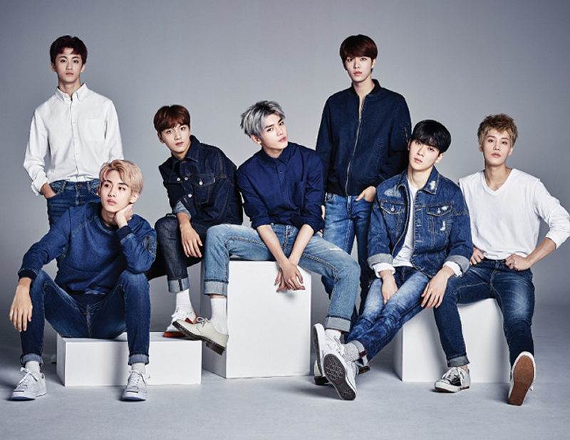 디자인유나이티드 X NCT127